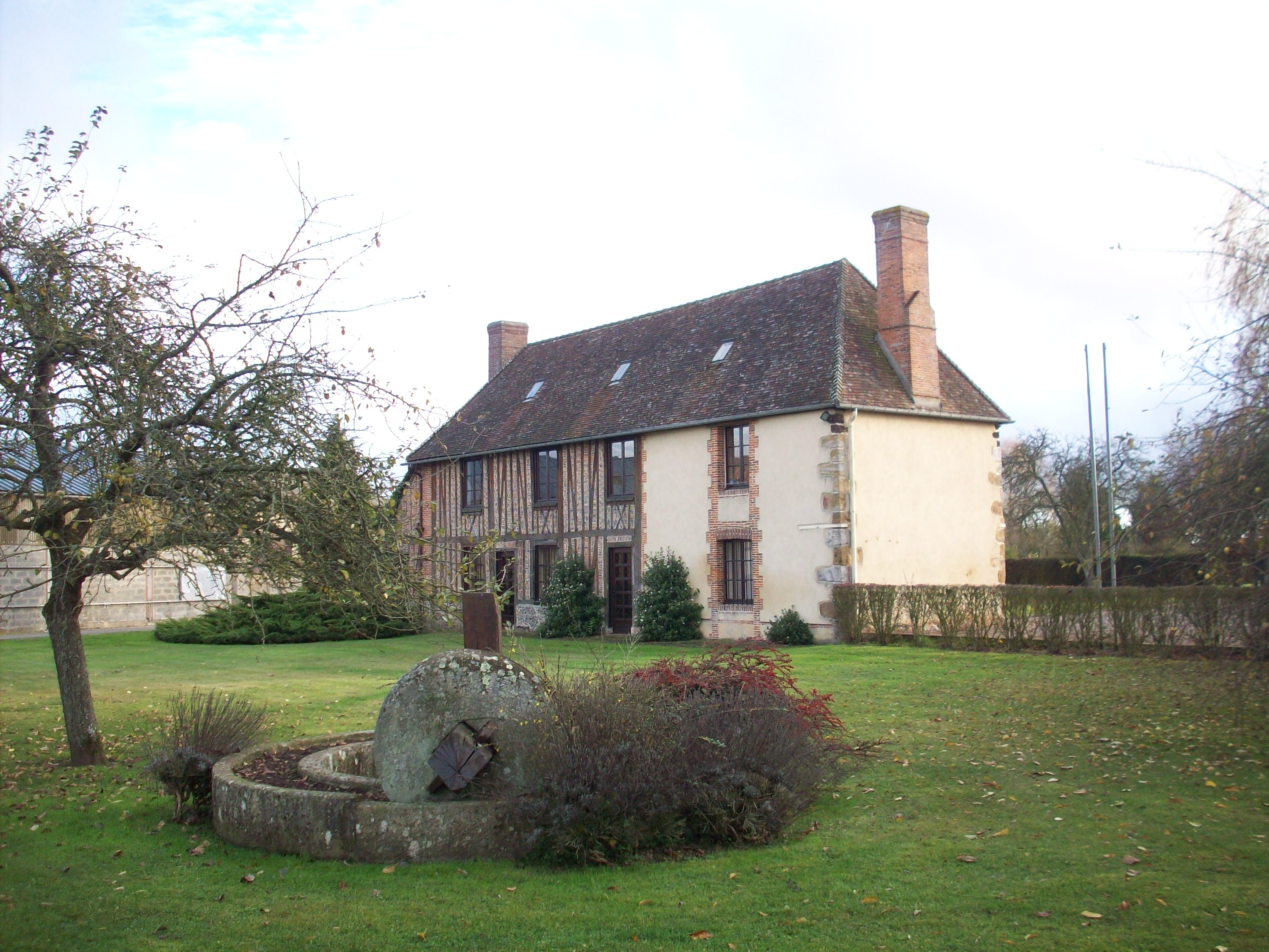 Ancien presbytère de la fin du XVIIIe, devenu en 1984 la mairie.